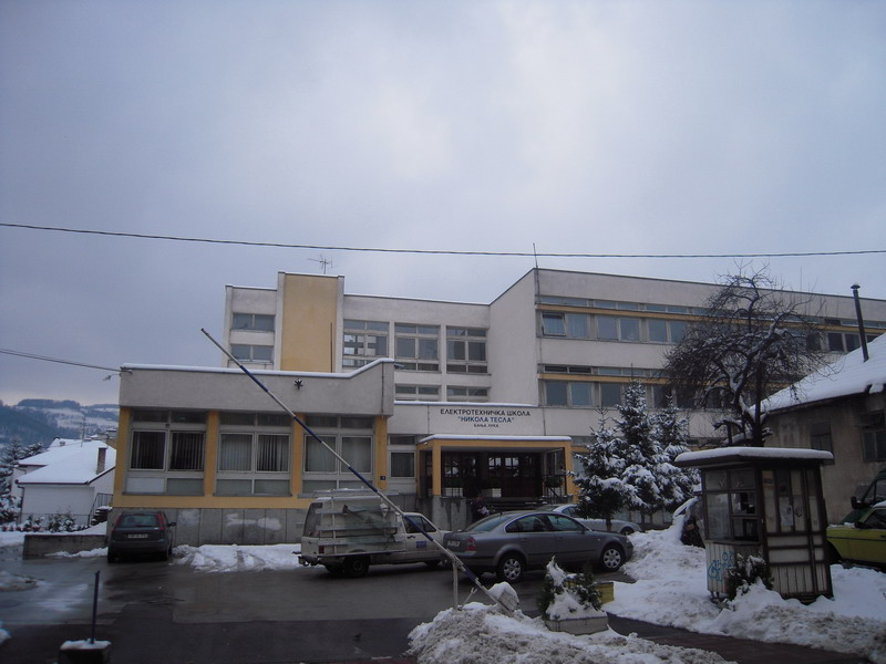 Електротехничка школа Никола Тесла у Бањој Луци